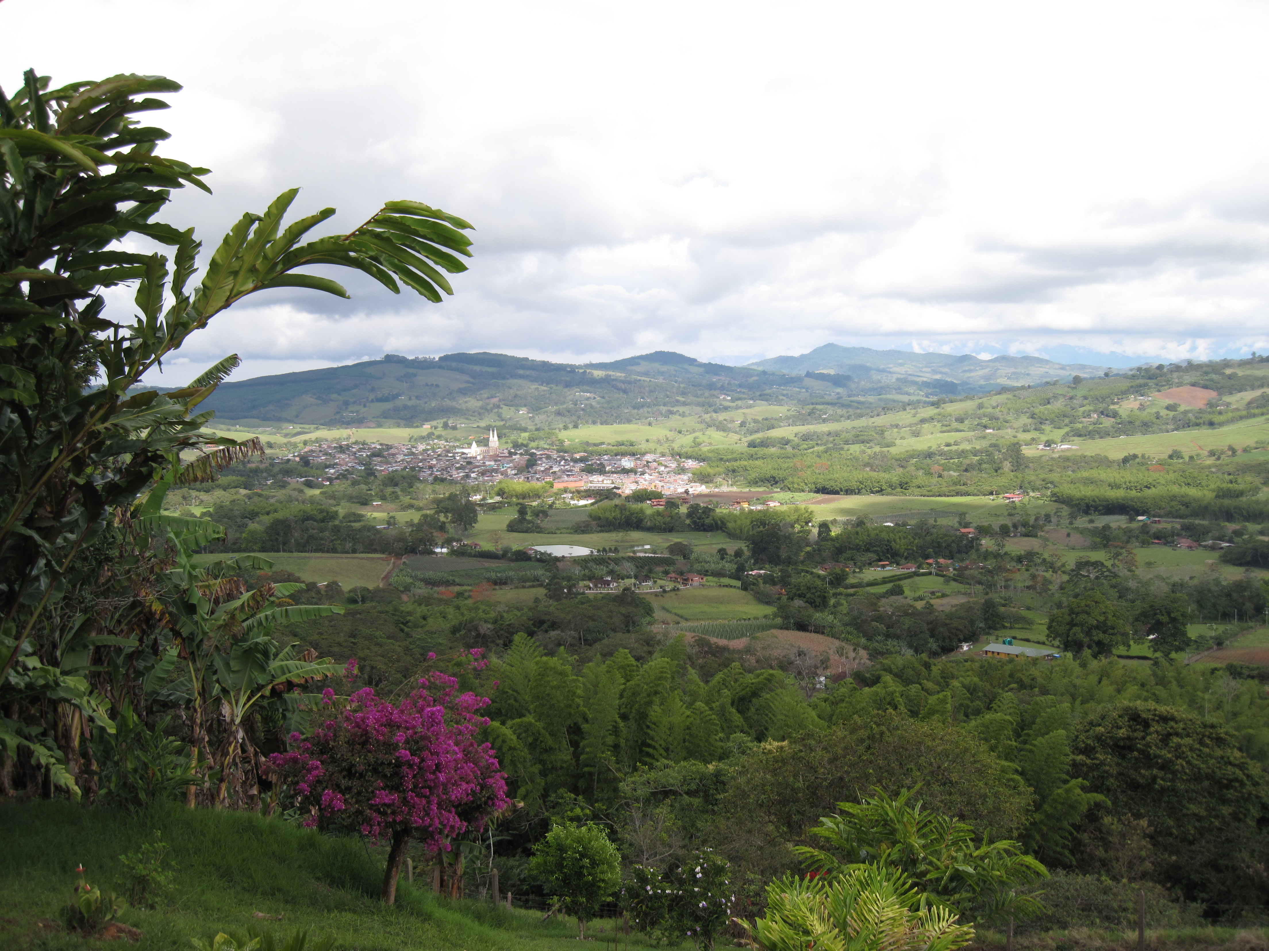 Restrepo, Sicht von San Pablo